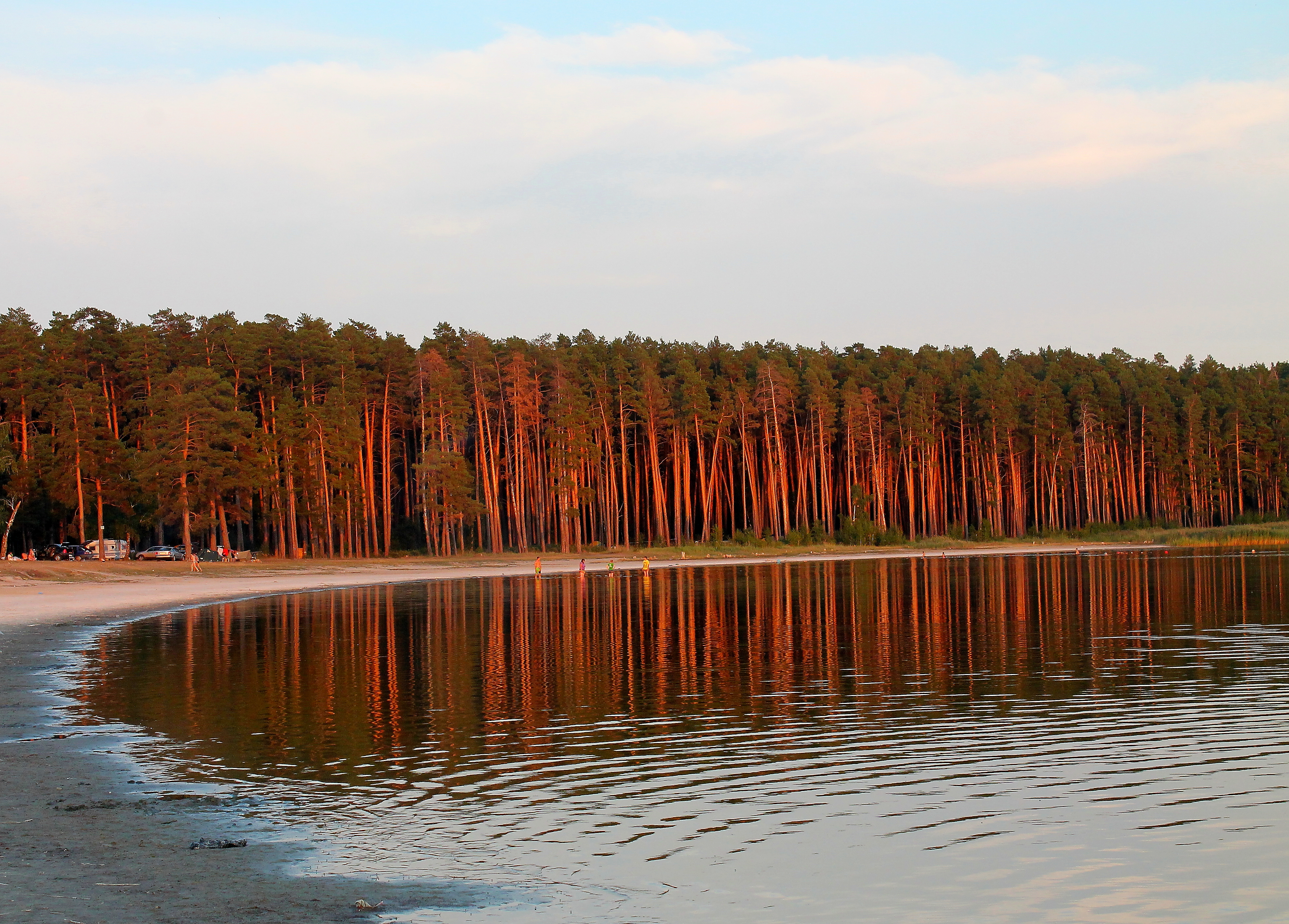 Озеро Горькое-Узково: Куртамышский район, Курганская область This image is related to the protected area of Russia number 4510052